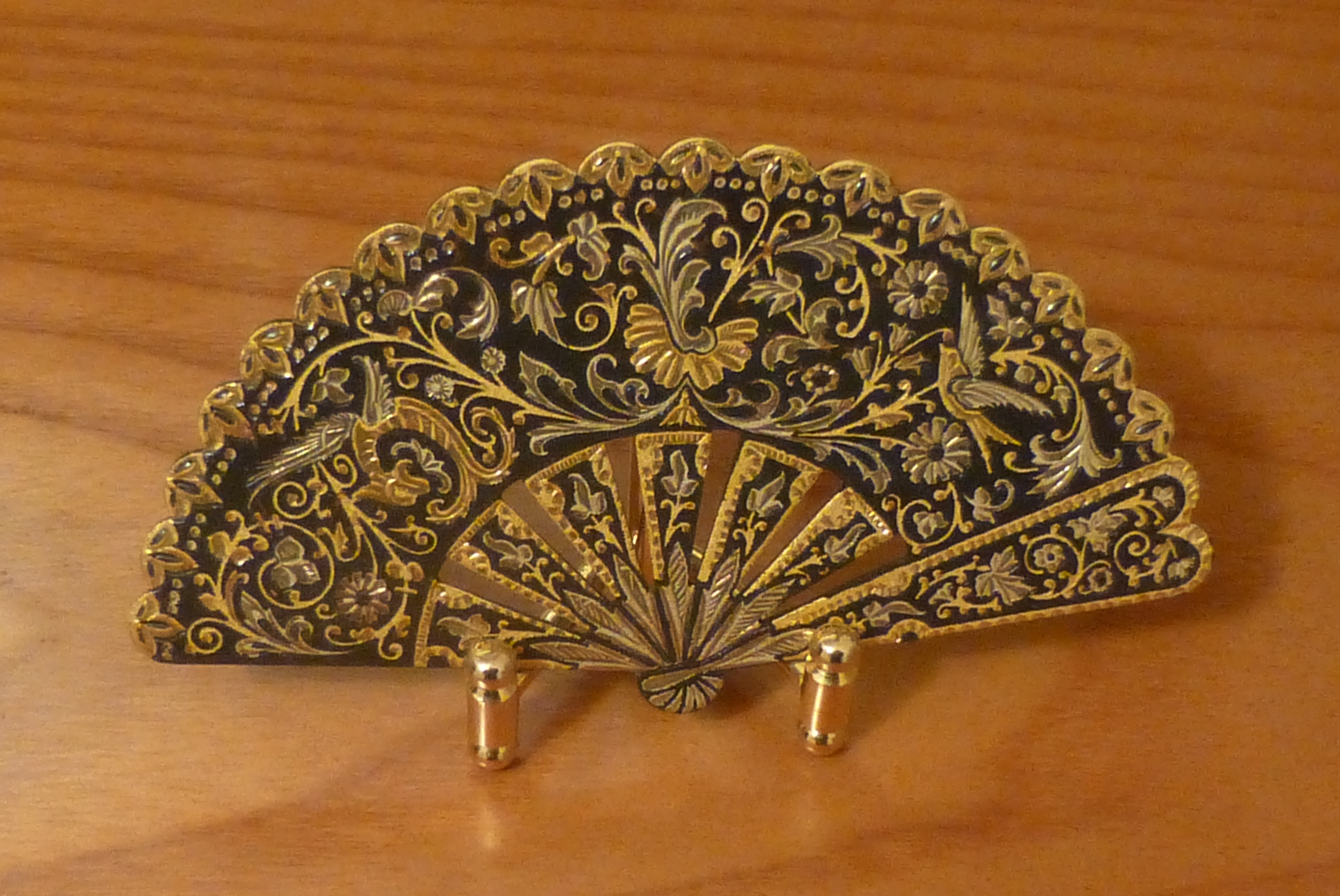 Pieza de damasquinado eibarrés.